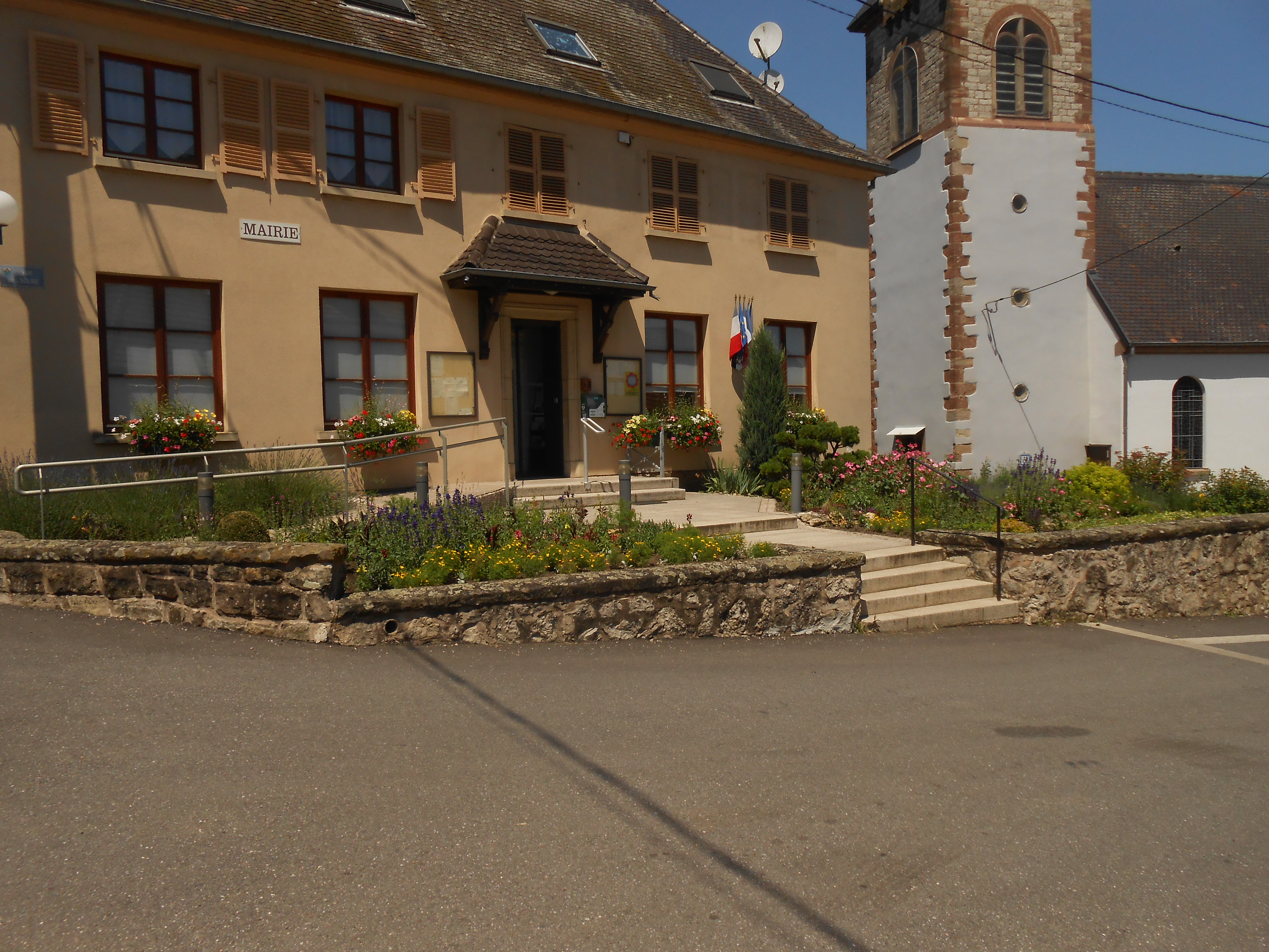 MAIRIE